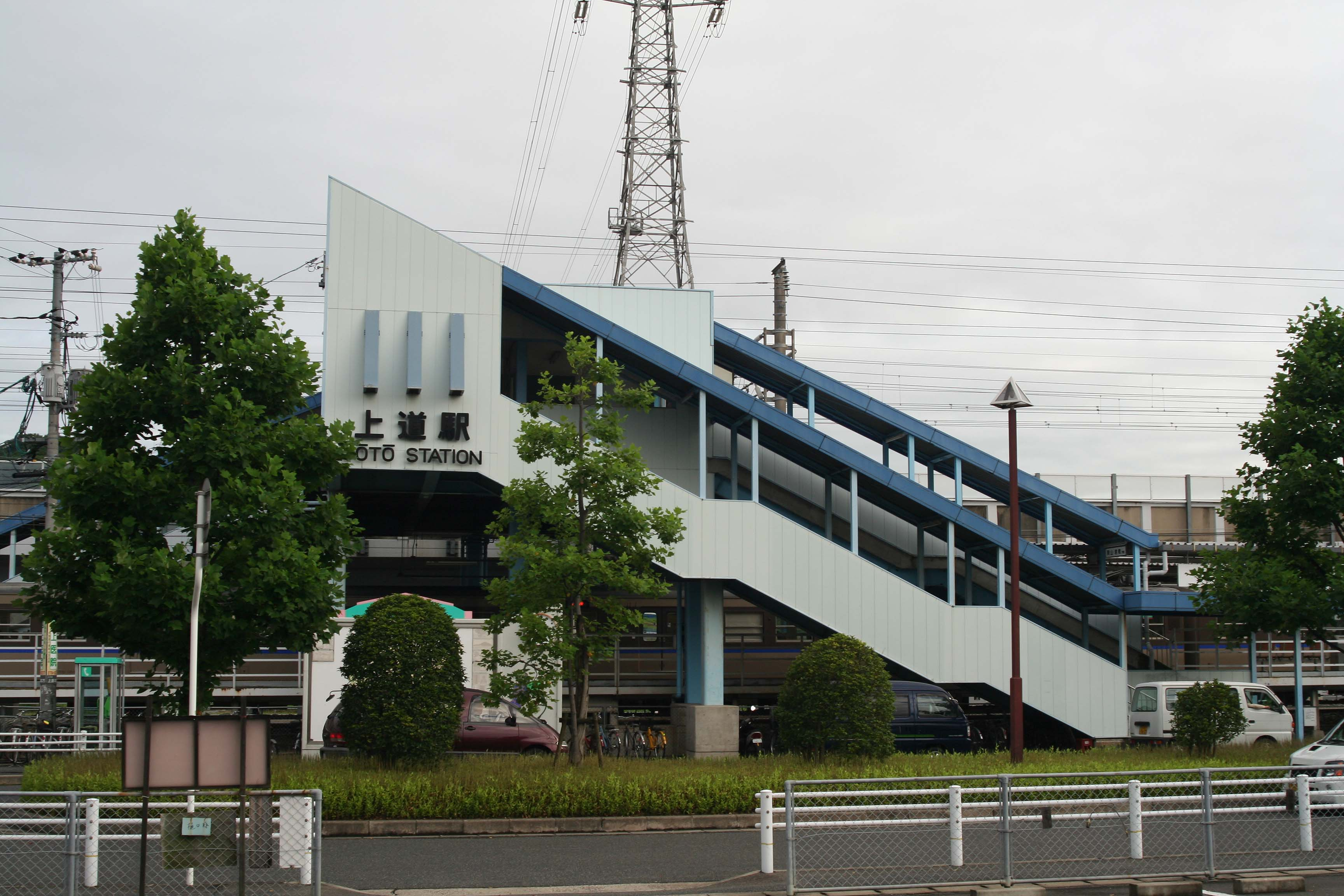 上道駅の駅舎